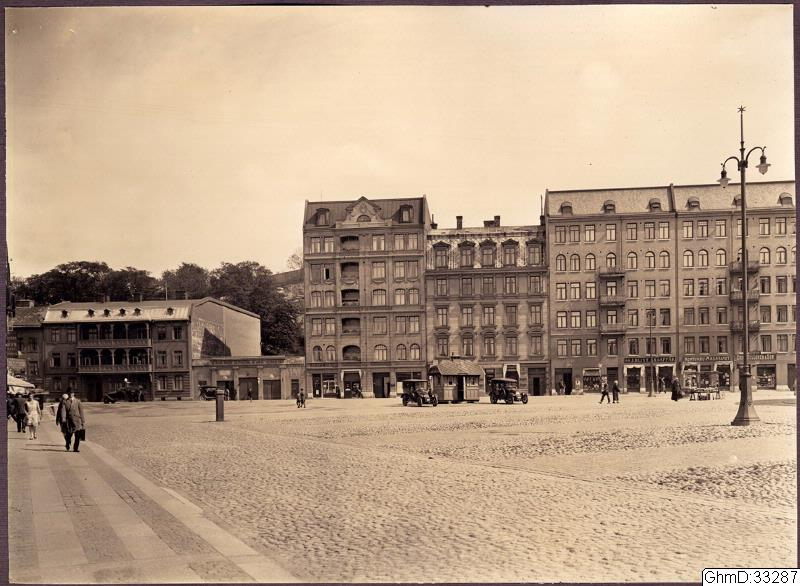 Taxikur, Skanstorget i Göteborg 1920-tal. I bakgrunden byggnaderna vid Skanstorgets östra sida, de två längst till vänster är rivna och ersatta med högre byggnader. GhmD-33287